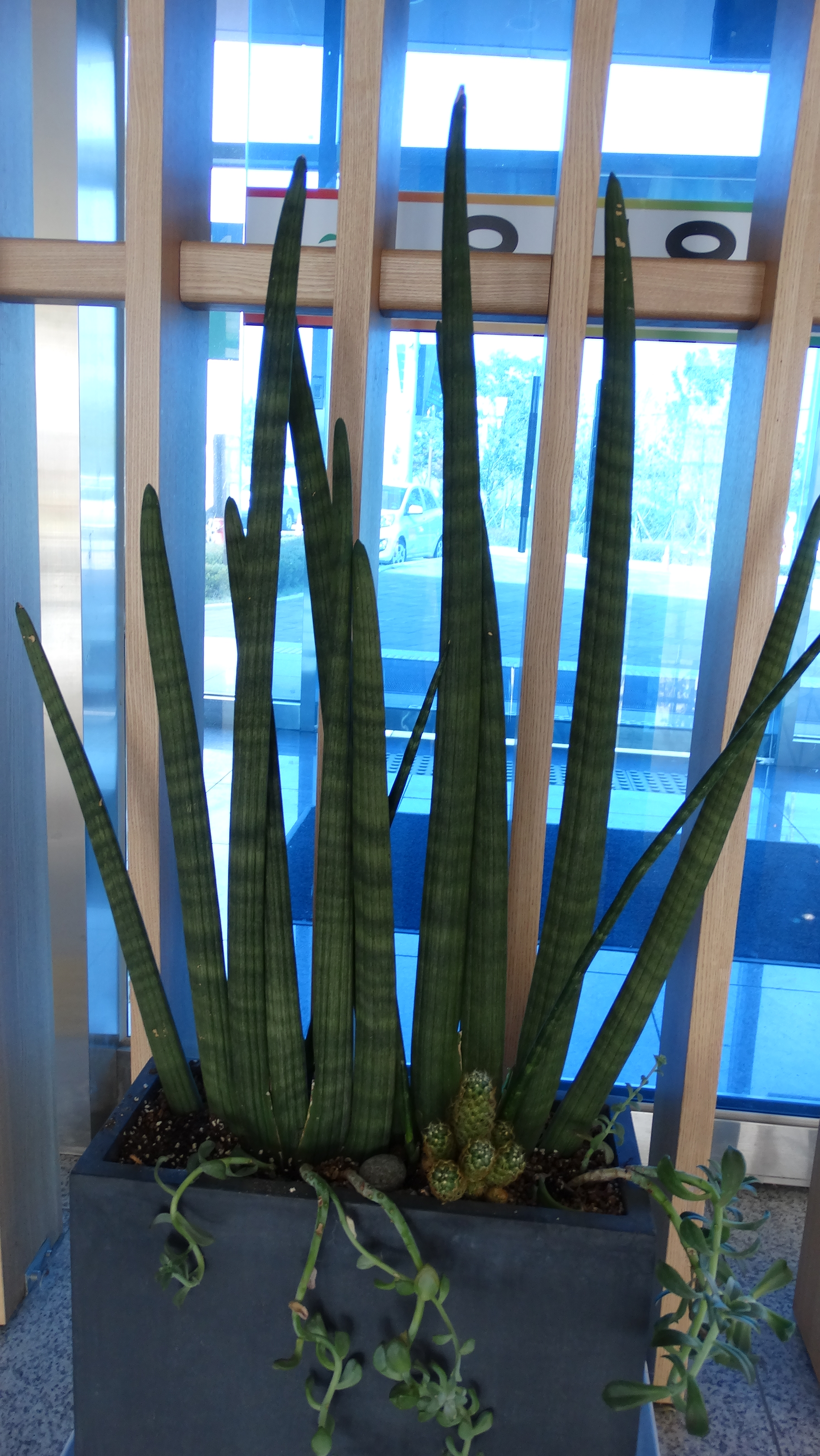 스투키 (1)